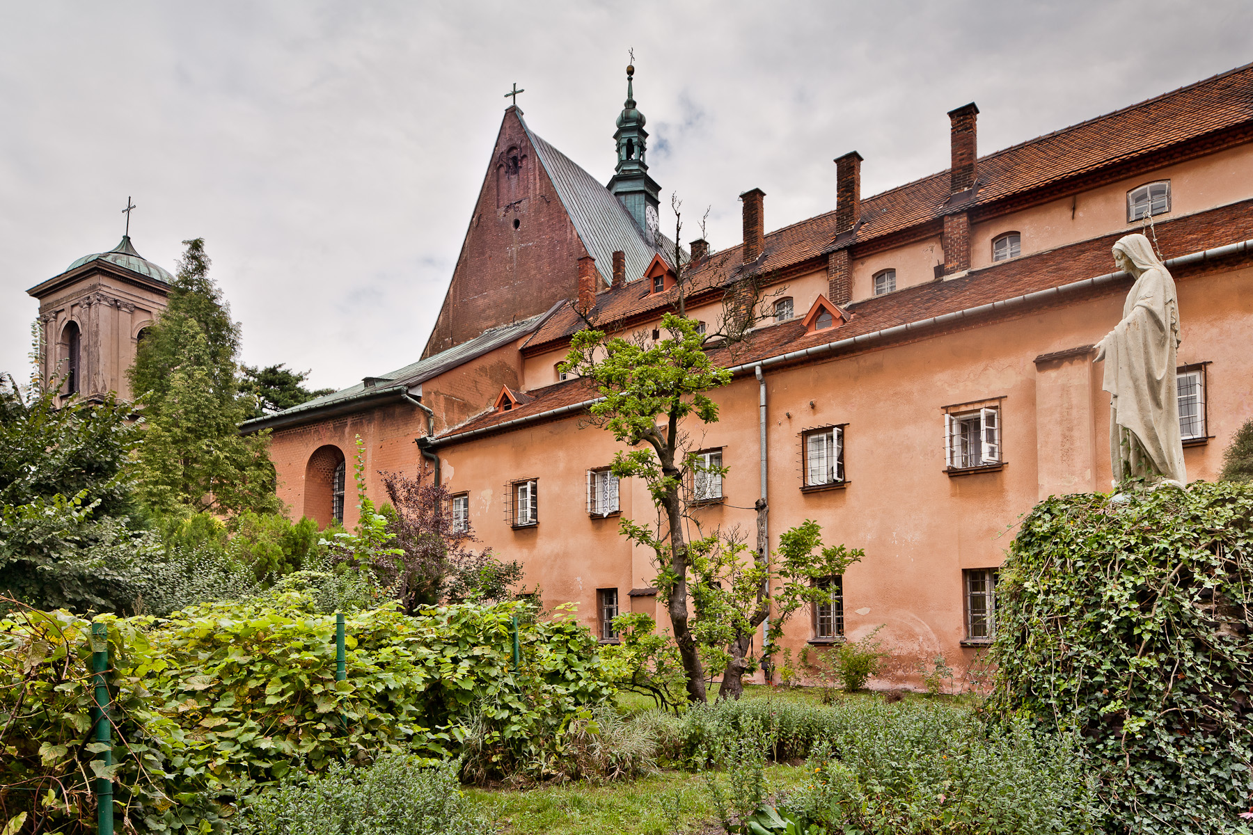 Zespół klasztorny Benedyktynek, Staniątki - zabudowania klasztoru